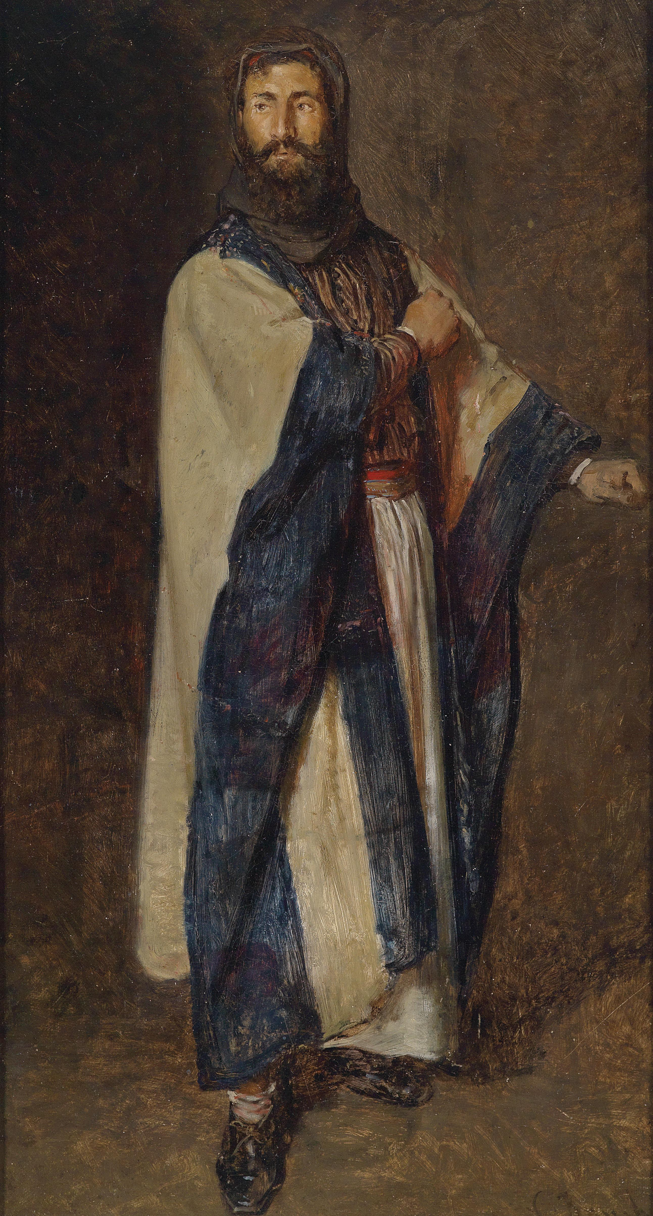 Beduine